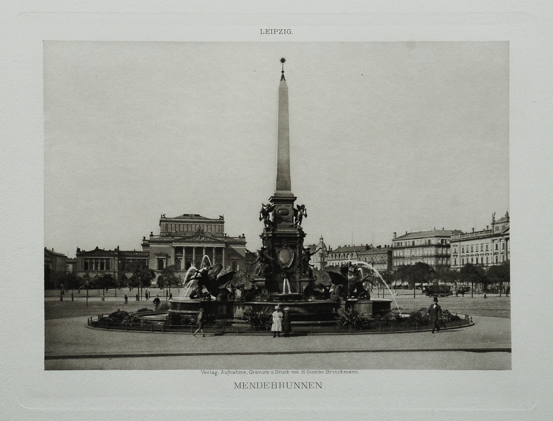 Leipzig, Mendebrunnen auf dem Augustusplatz 1898 Heliogravur 19 x 25 cm Plattenrand, Verlag und Kunstanstalt Gustav Brinkmann Leipzig.